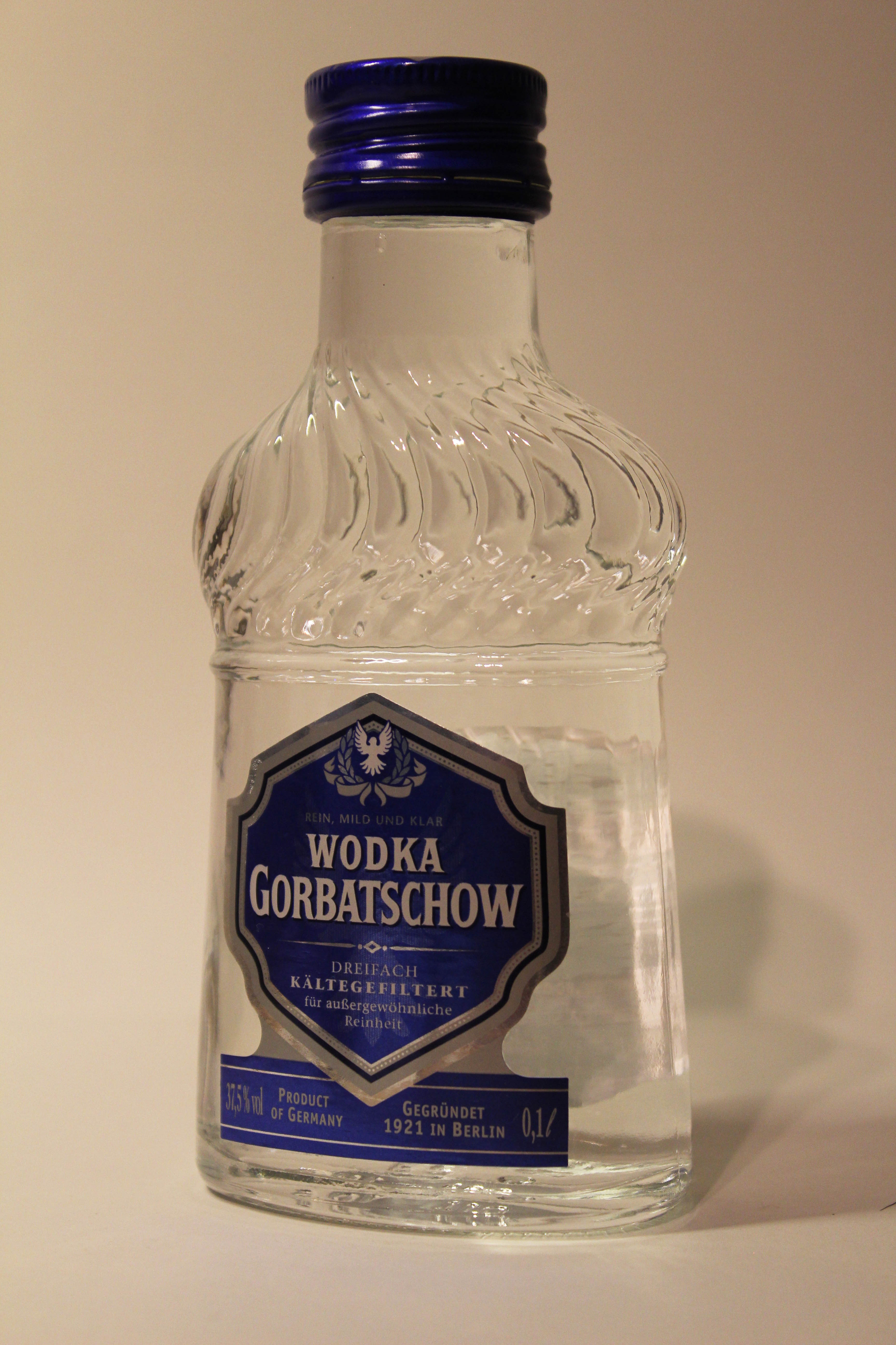 Wodka Gorbatschow in 0,1l-Flasche.